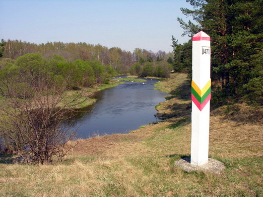 Valstybę sieną žymintis stulpas Foto: Algirdas, 2006 m. gegužės 4 d.